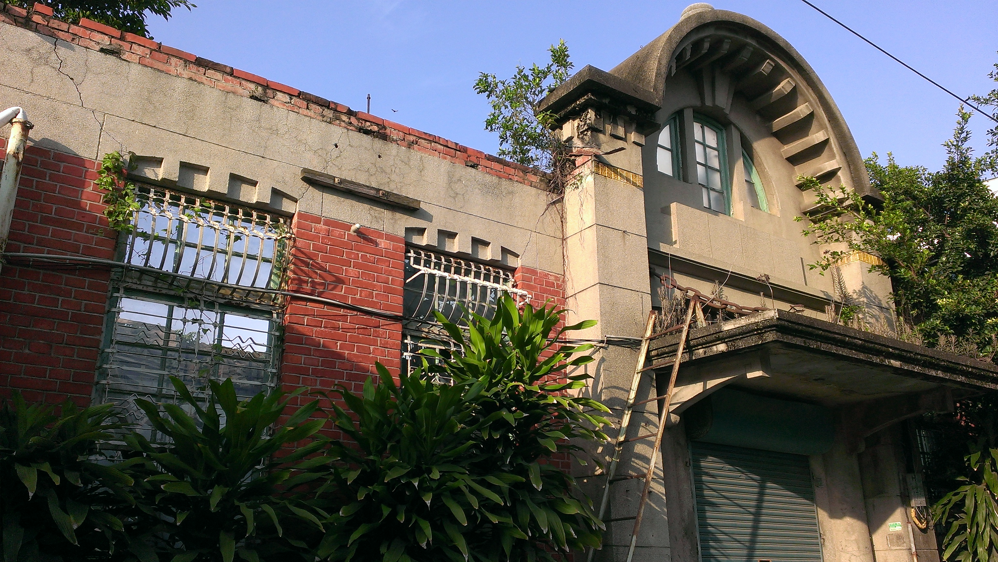 雲林縣歷史建築──原大埤鄉農業信用組合